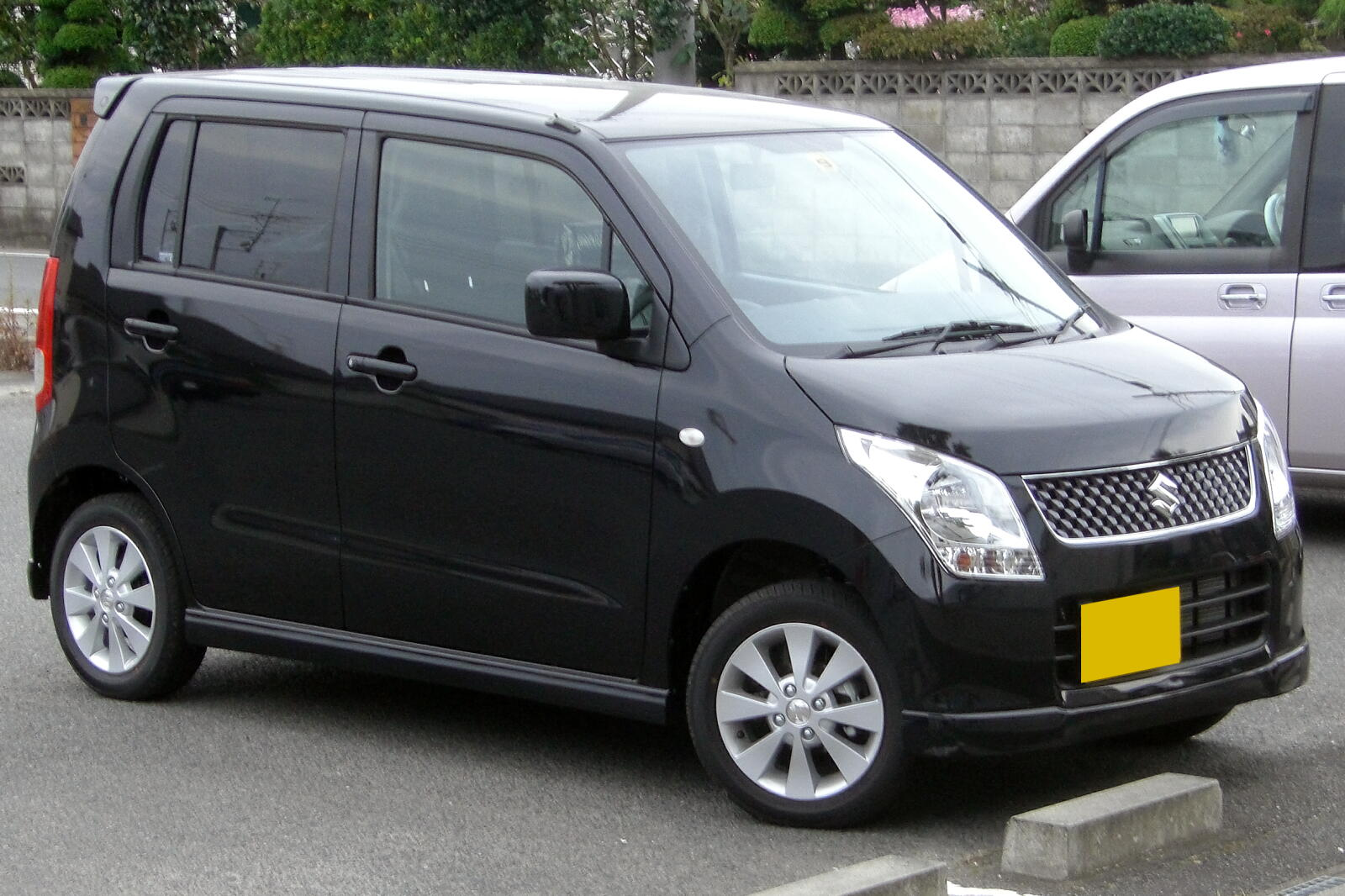 スズキ・ワゴンR（4代目）